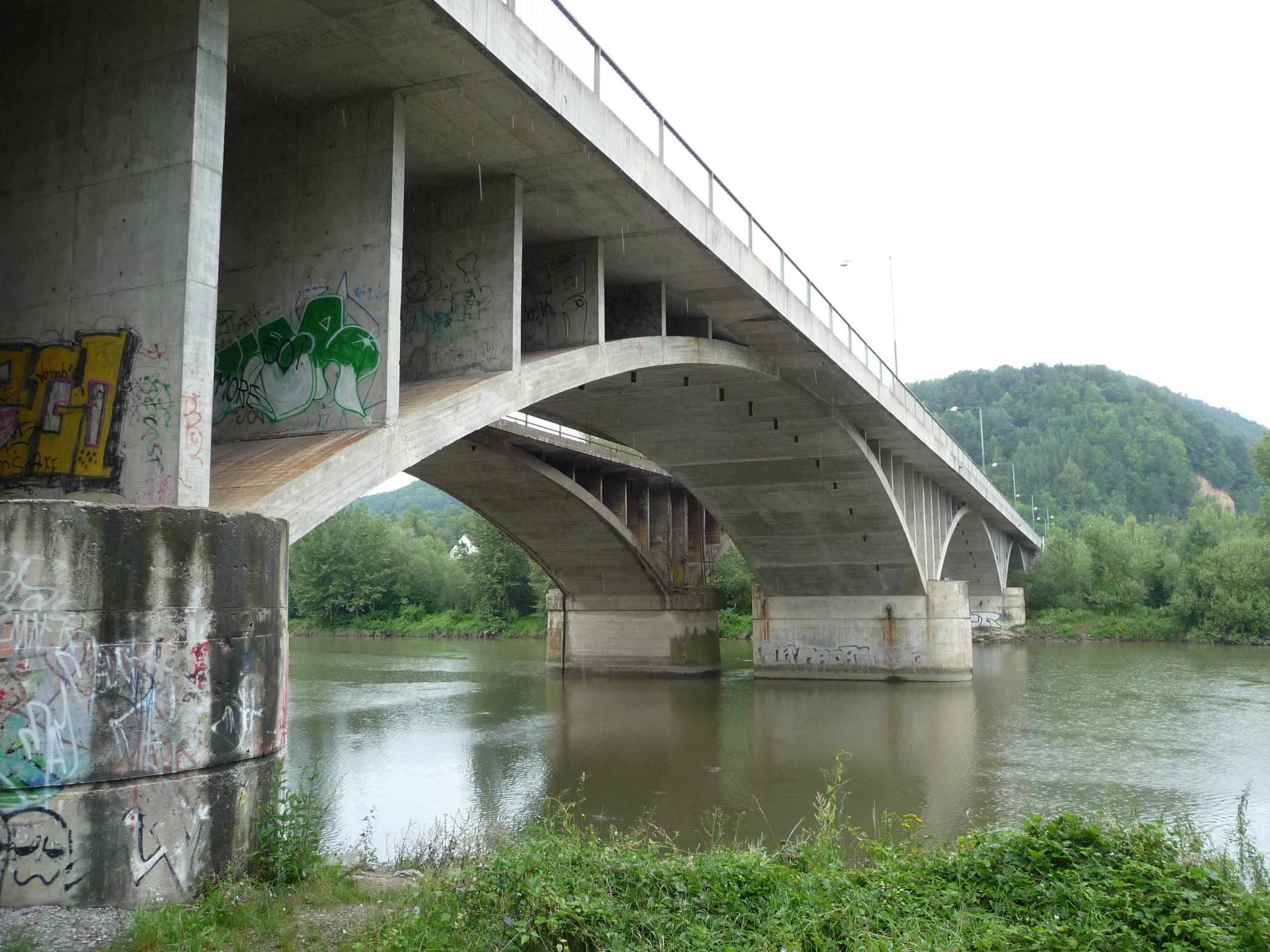 Orlovský most v Považské Bystrici.